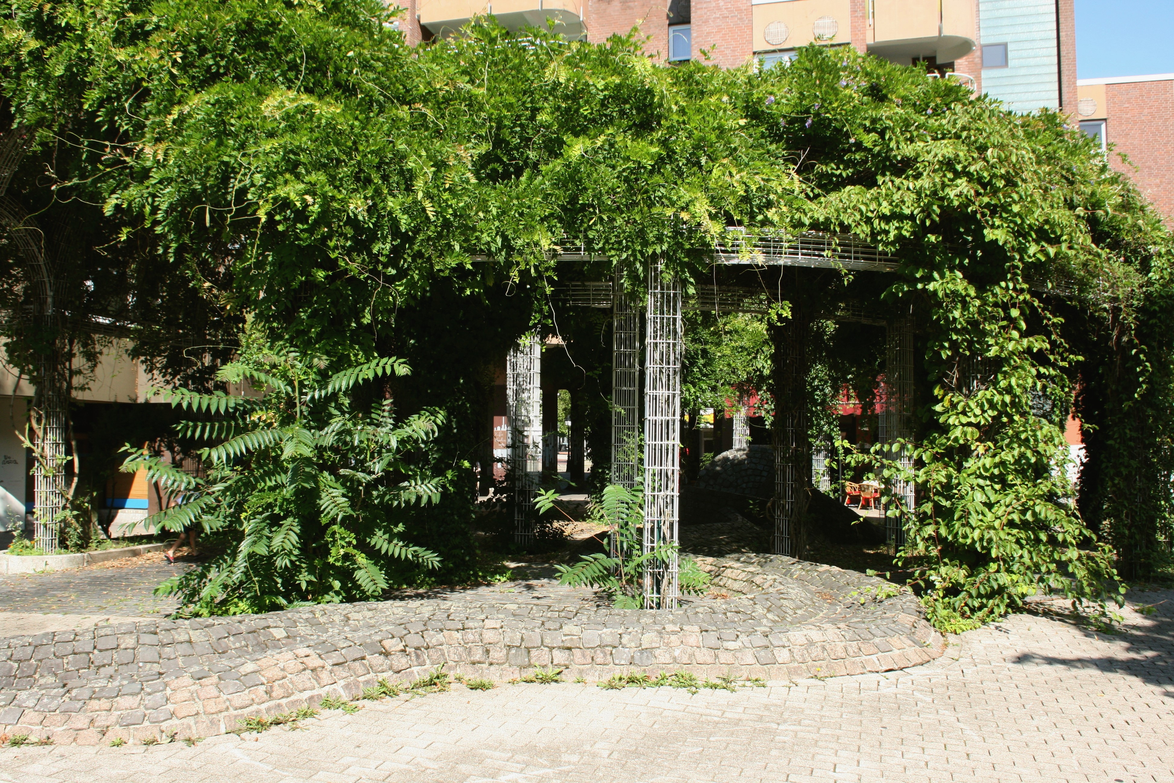 „Bachlauf Bramhügel“ des Architekten Willi Balzer, Ewaldstraße in Herten